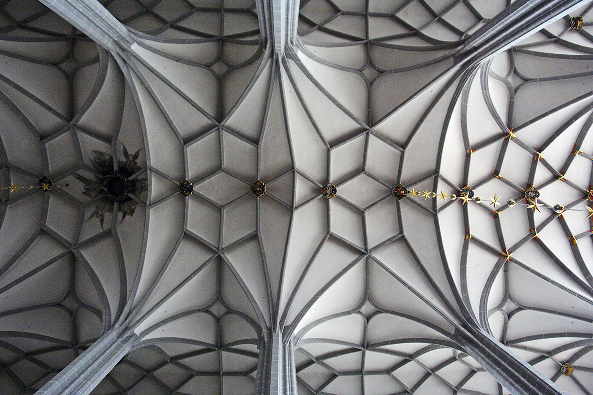 Görlitz, Peterskirche, Deckengewölbe